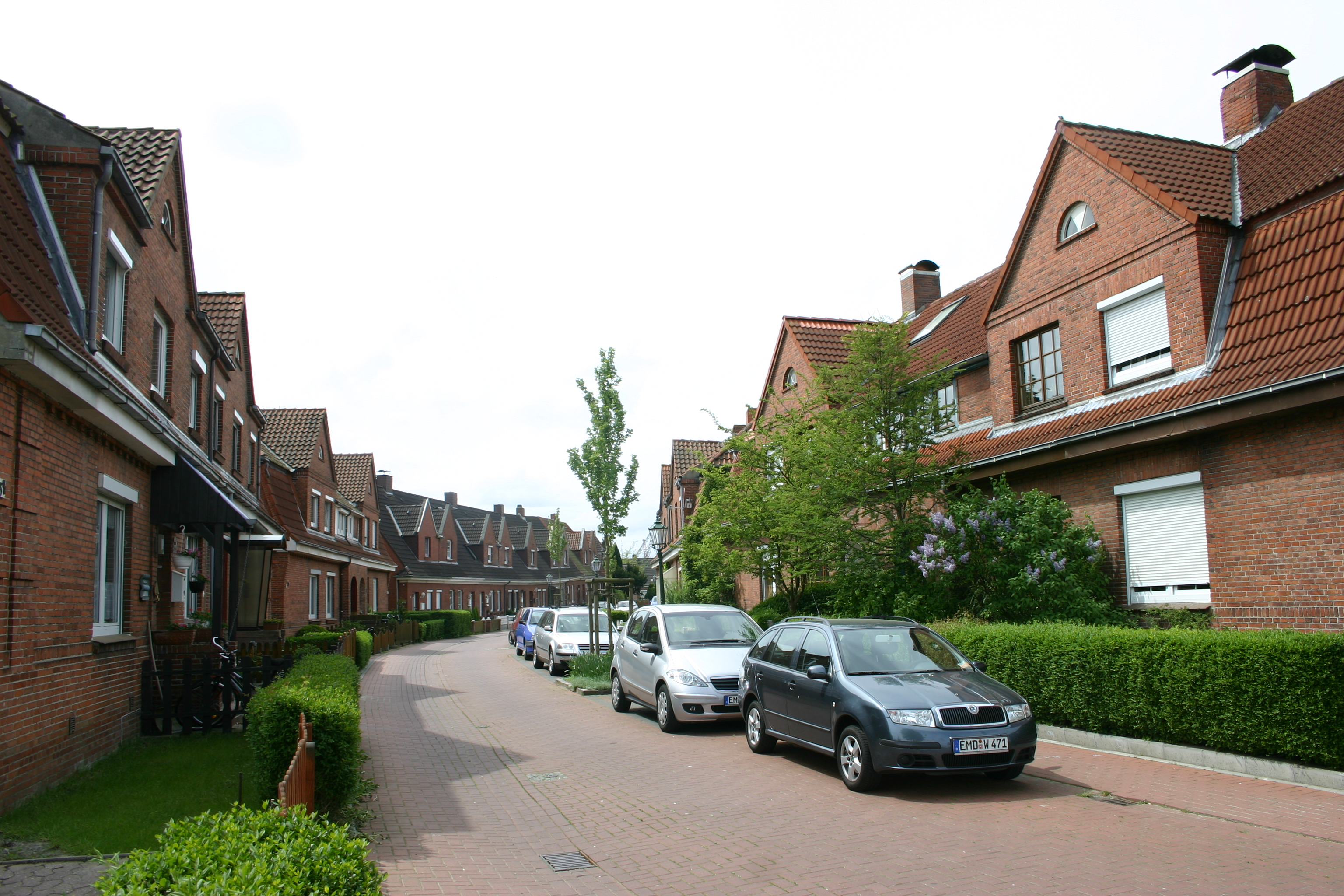 Juiststraße in Emden-Friesland(Ostfriesland, Niedersachsen), einer Arbeitersiedlung der 1920er Jahre